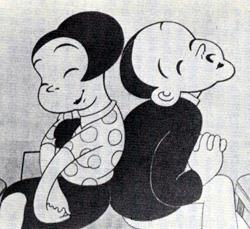 immagine tratta dal cortometraggio d'animazione giapponese Chikara to Onna no Yo no Naka del 1932